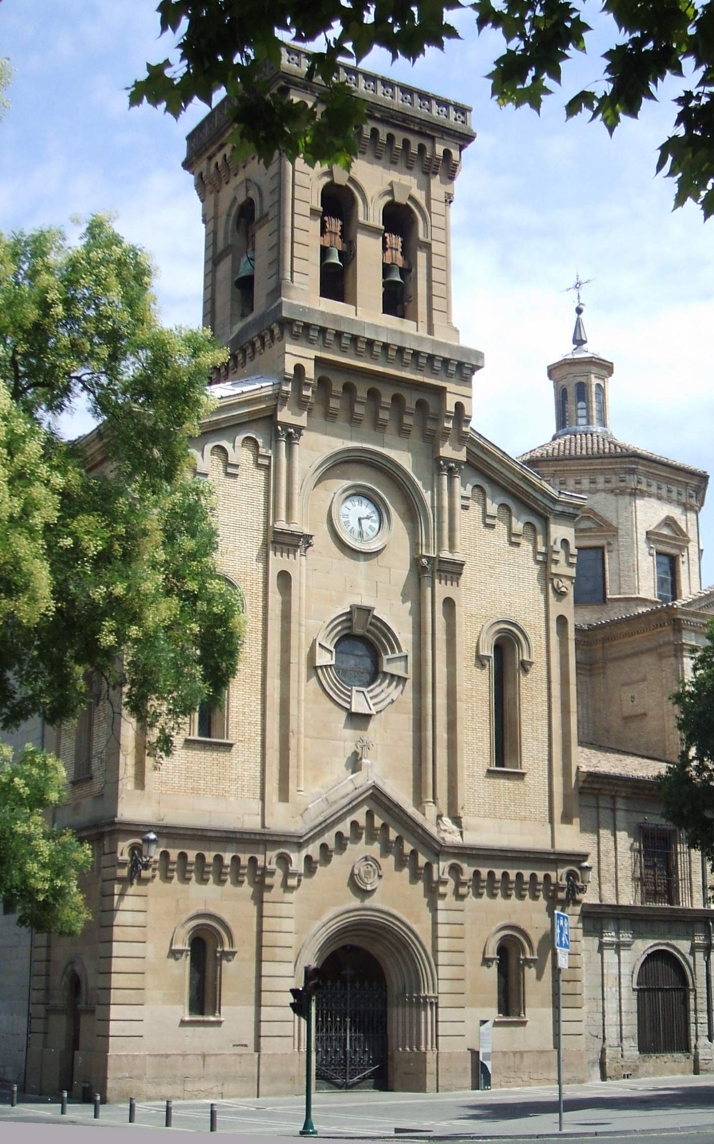 Iglesia de San Lorenzo (Pamplona)